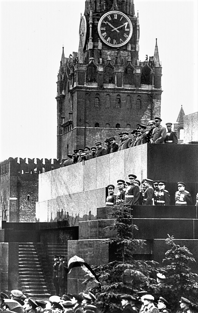 Трибуна мавзолея Ленина во время Парада Победы